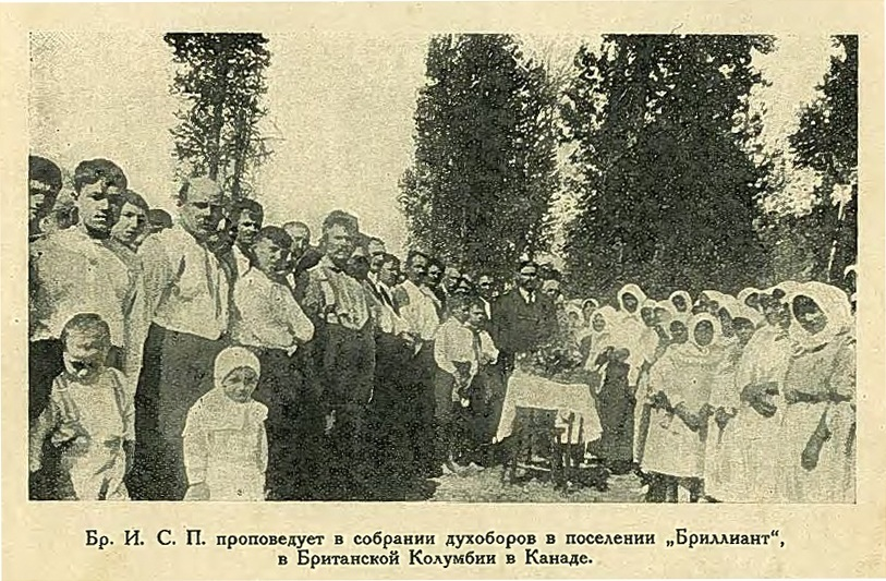 И. С. Проханов проповедует среди духоборов Канады